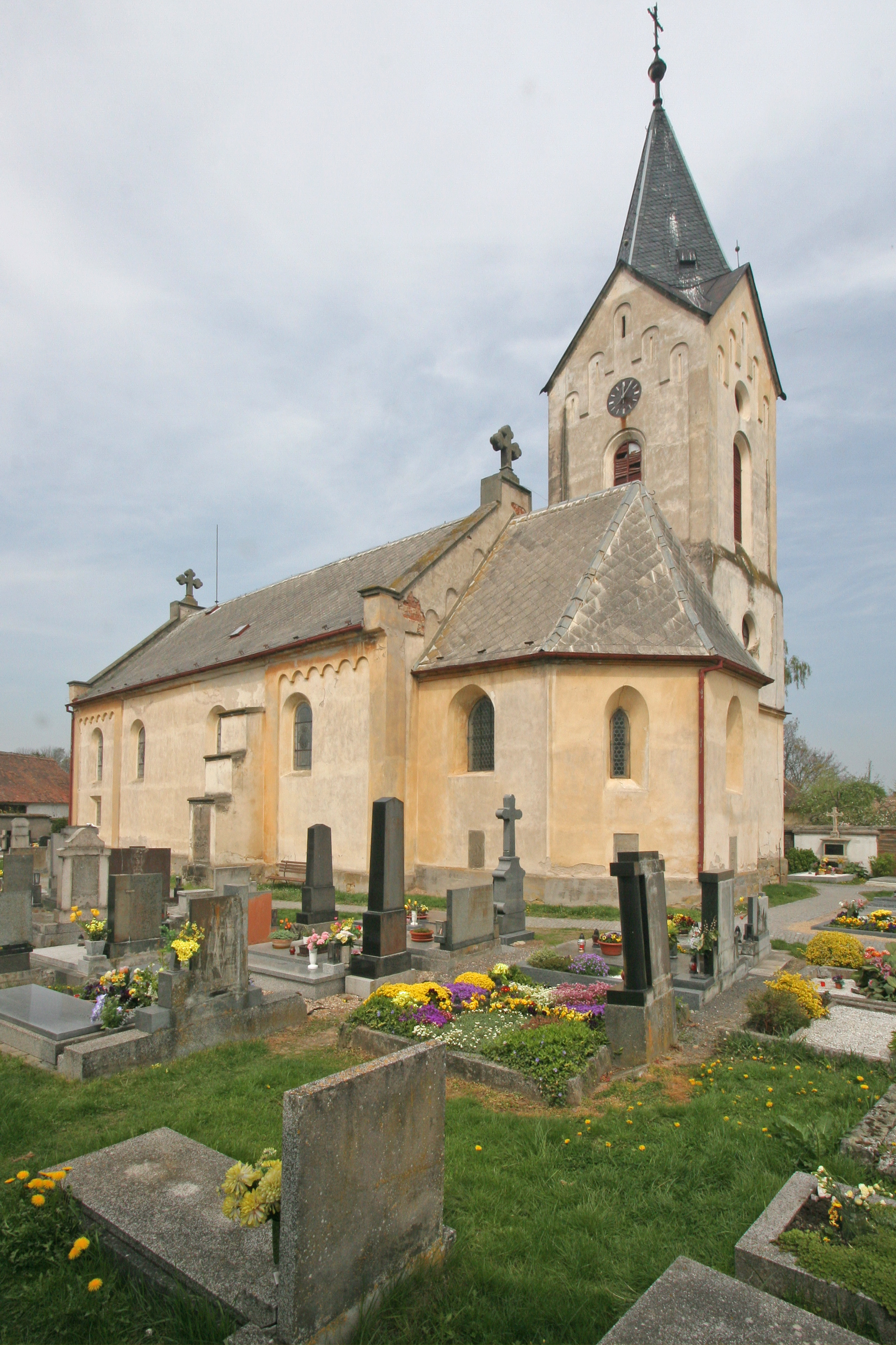 Morašice kostel svatého Víta